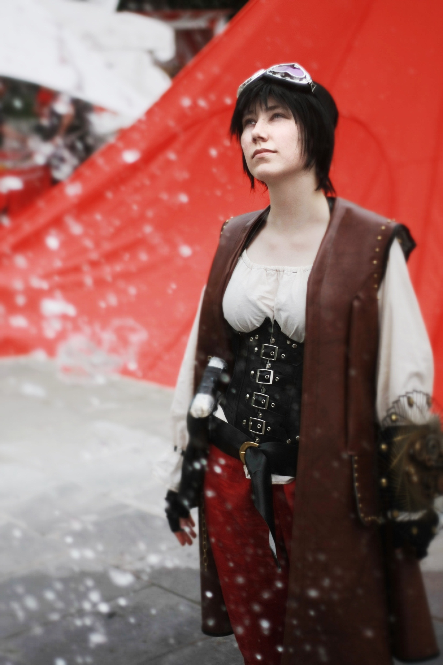 Lady Hawk (skypirate)